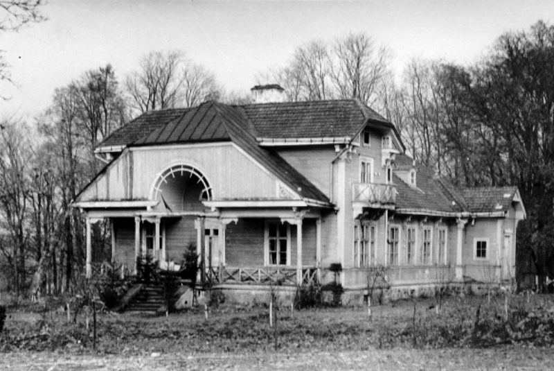 Беларуская (тарашкевіца): Уселюб (Usielub), сядзіба О'Руркаў (O'Rourk)